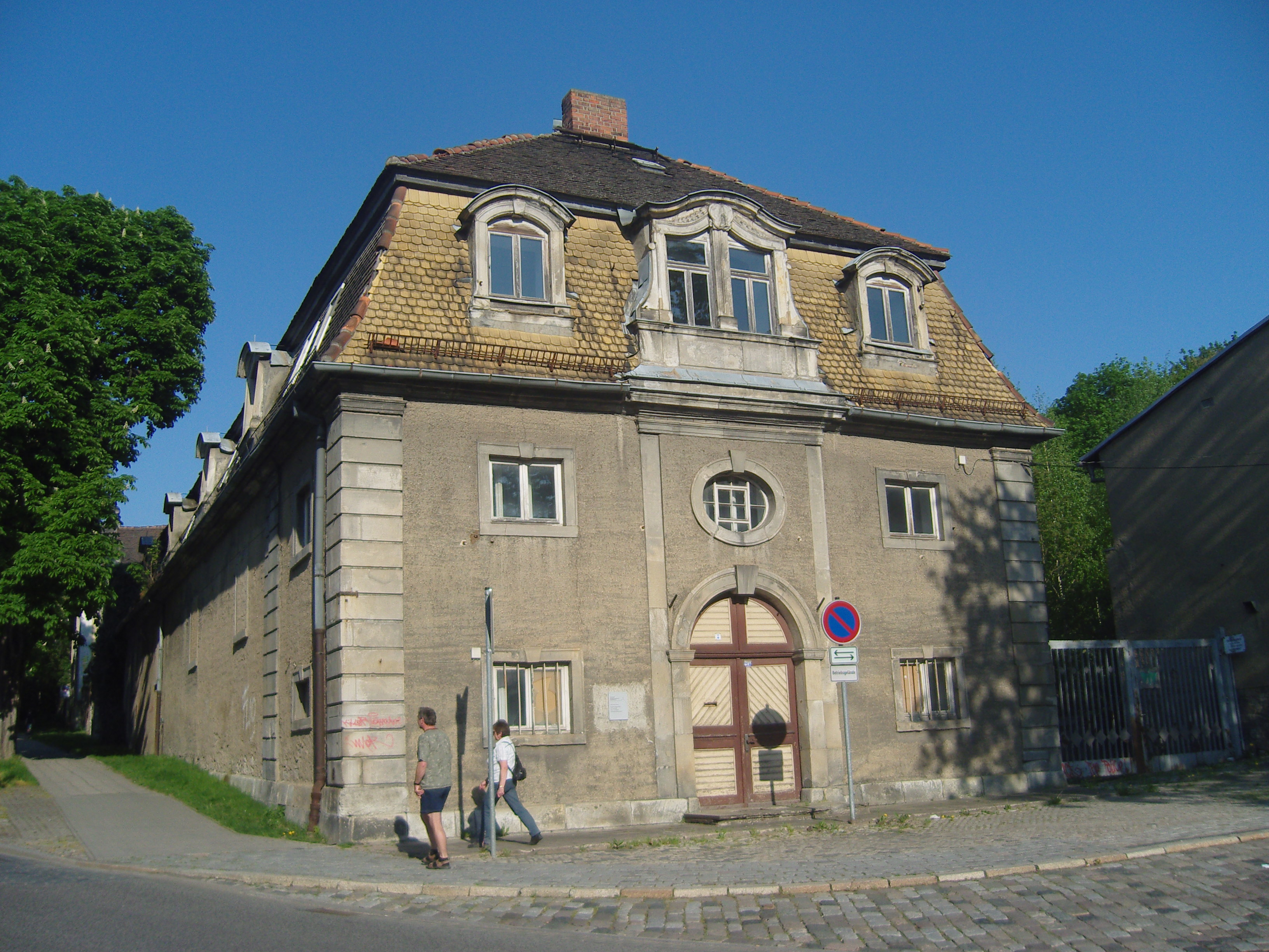 Denkmalgeschützter Marstall in Weißenfels in der Zeitzer Straße 21 erbaut von Christoph Schütze